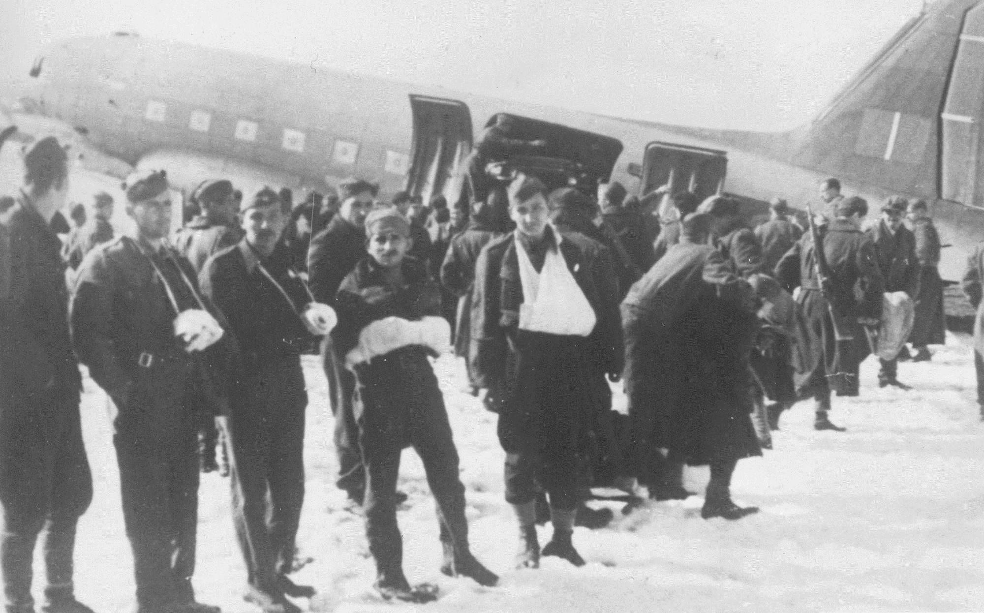 Lahko ranjeni partizani čakajo na vkrcanje na letalo .